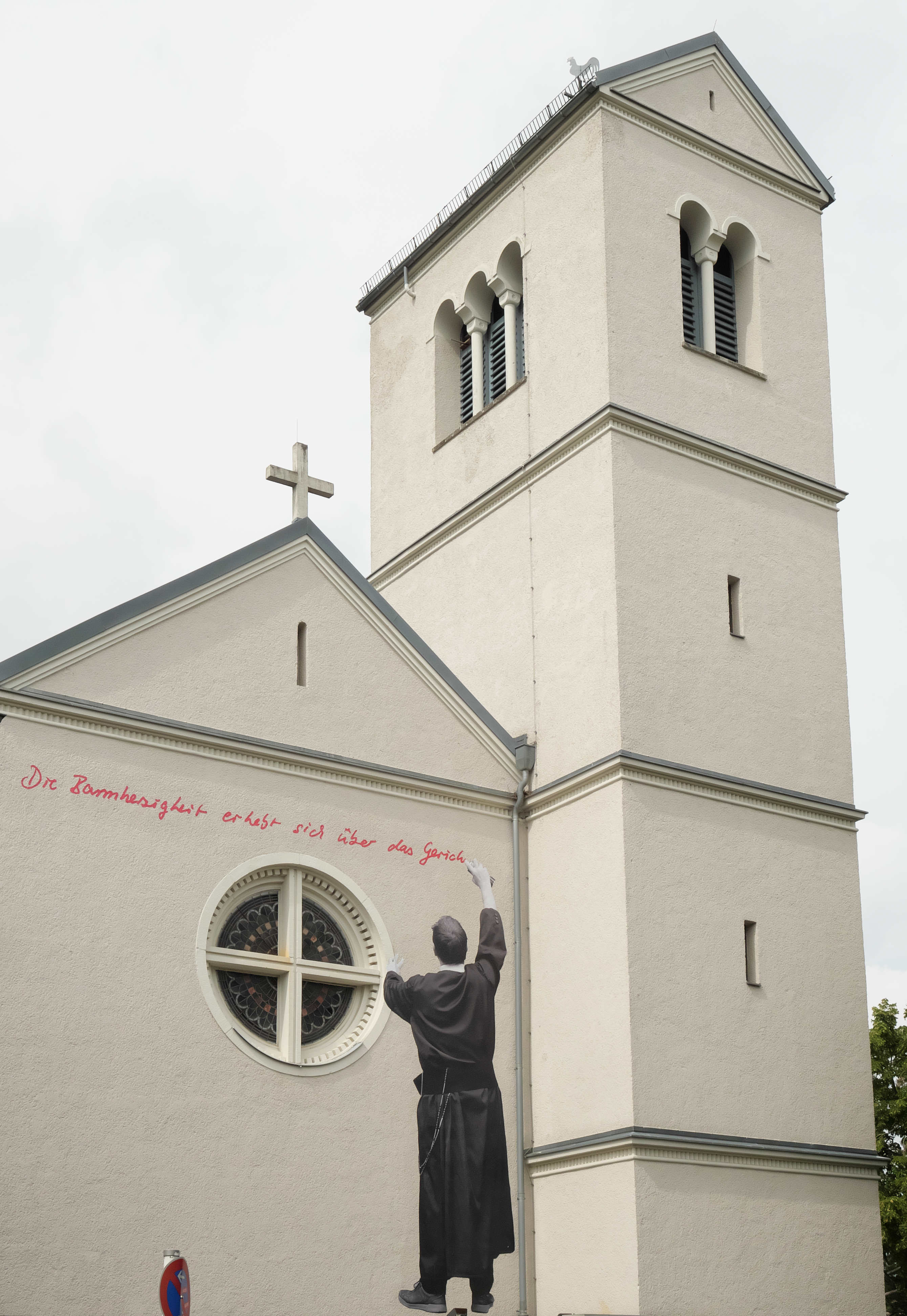 Paste Up History - Marienfelde Goes Street Art, Sankt-Alfons-Kirche, Redemptorist